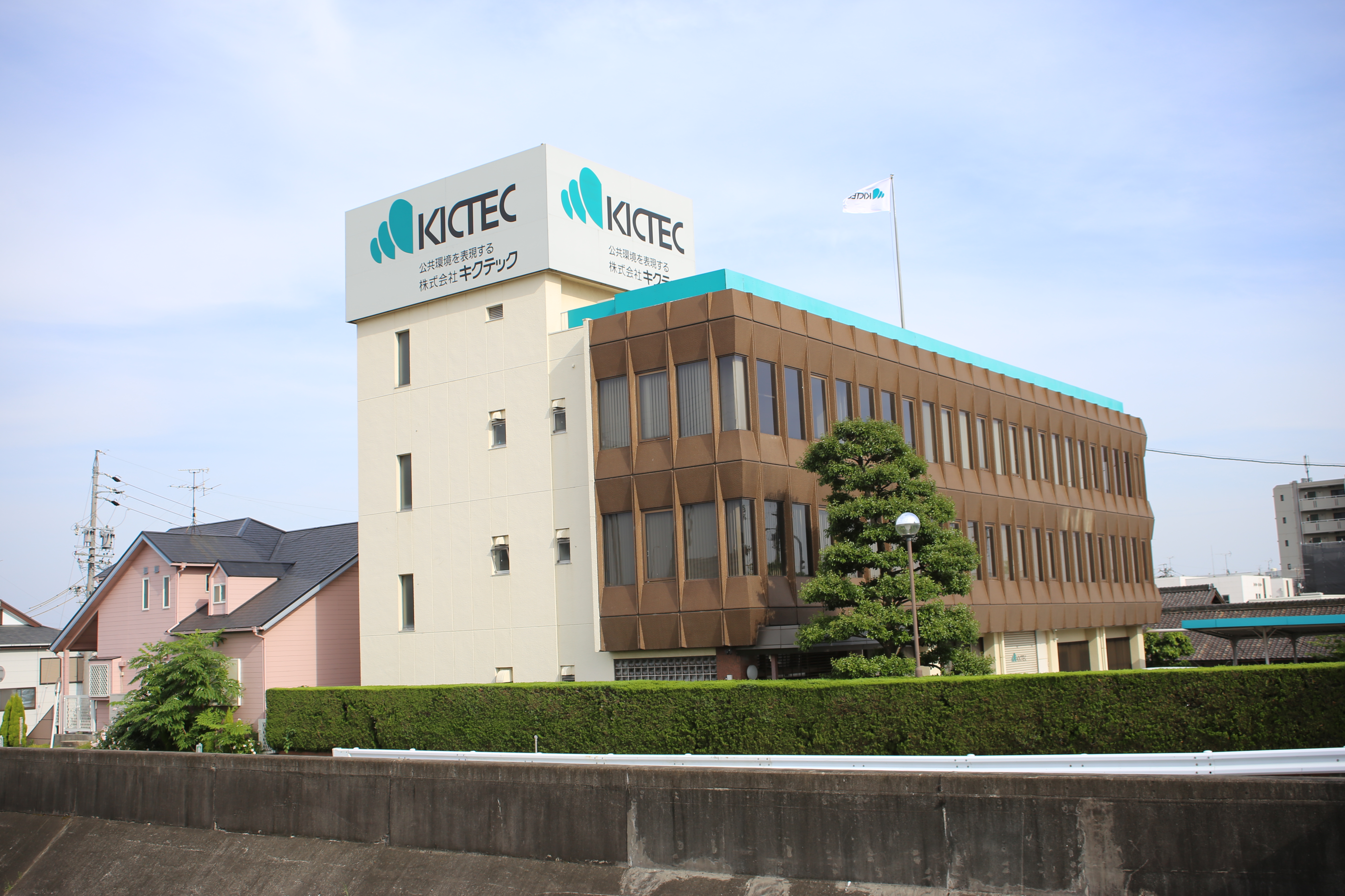 名古屋市南区加福本通のキクテック本社を西側公道北側より撮影